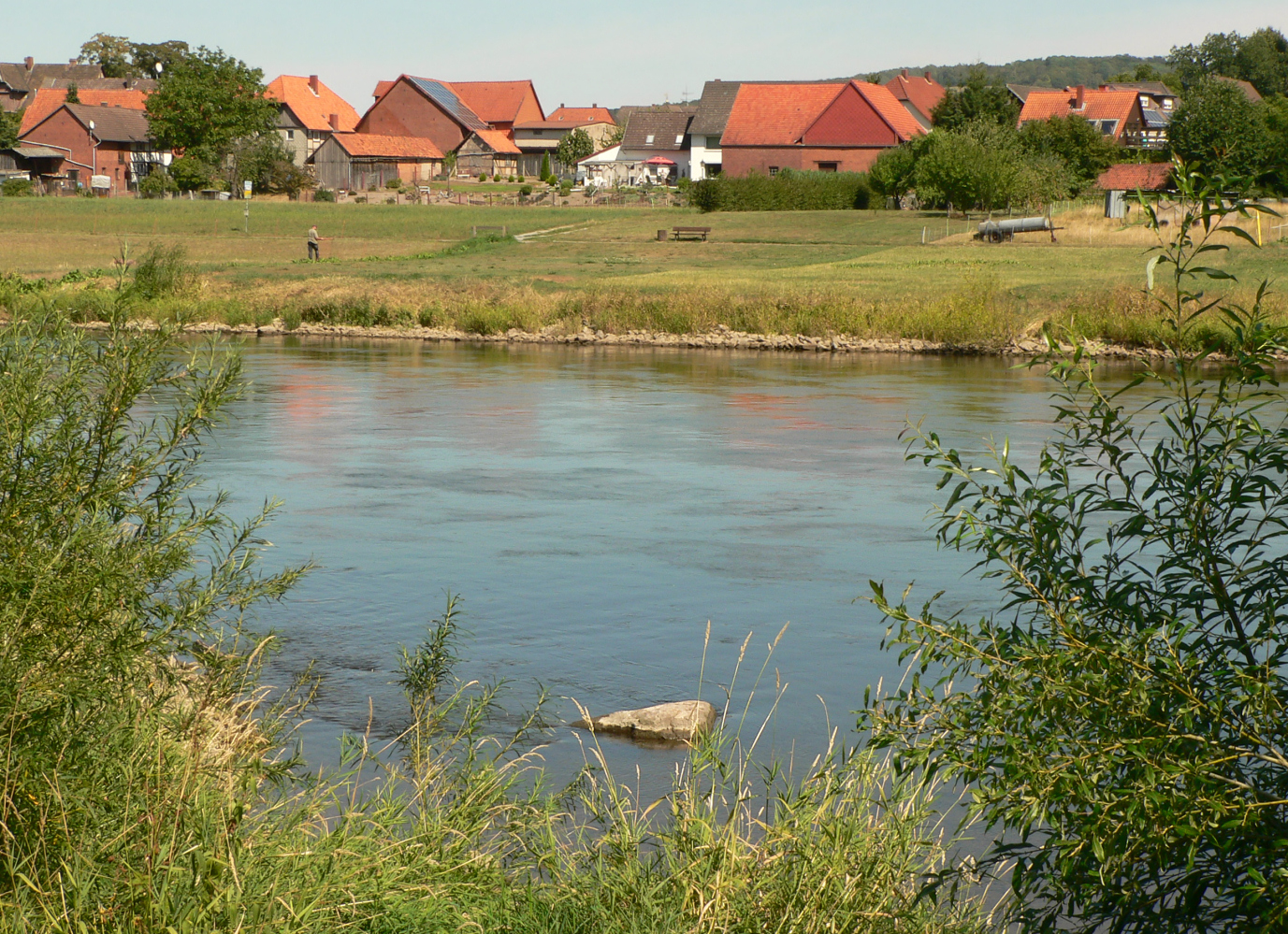 Hajener Hungerstein am westlichen Weserufer, im Hintergrund Hajen